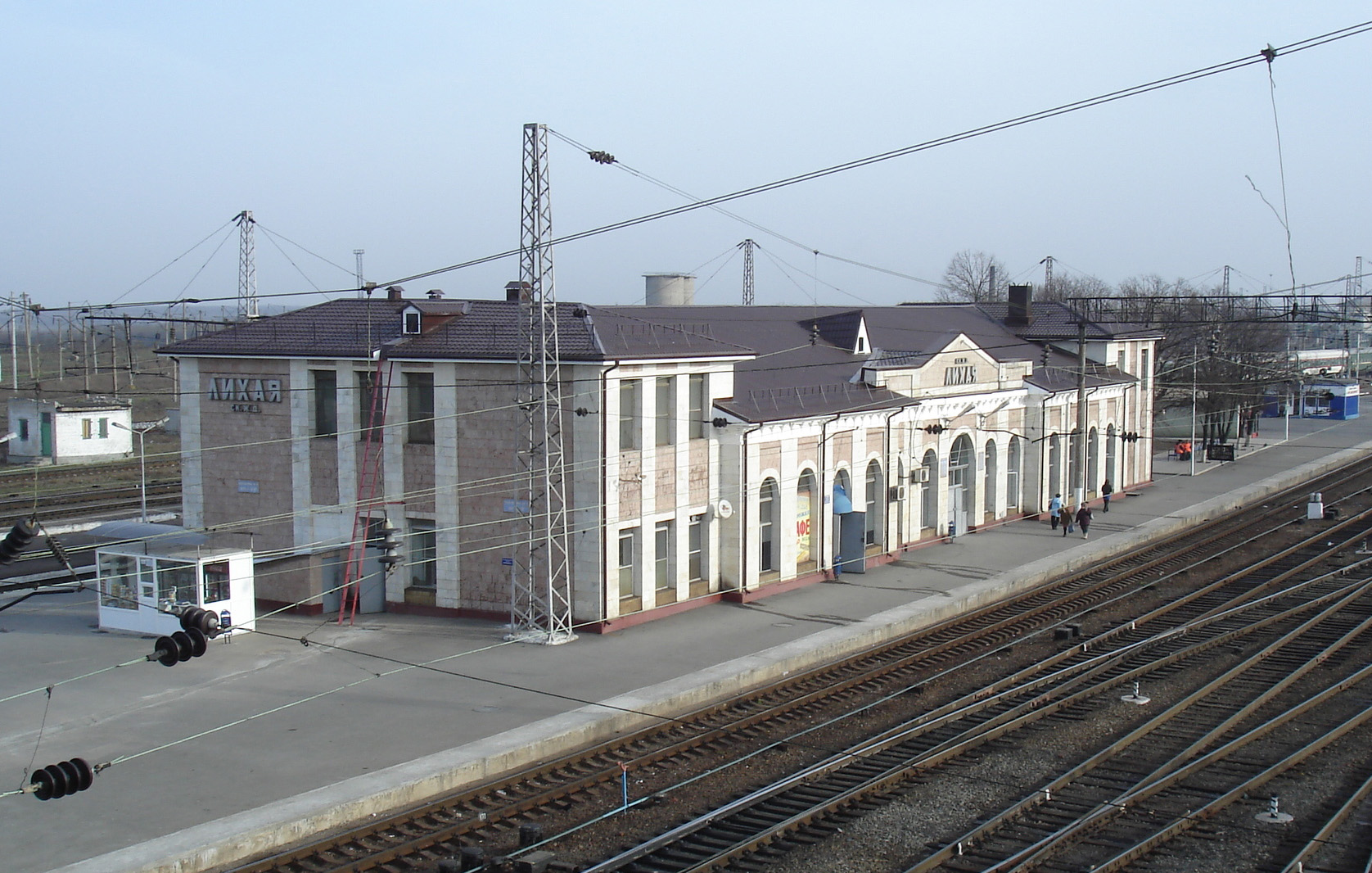 ЖД-станция Лихая